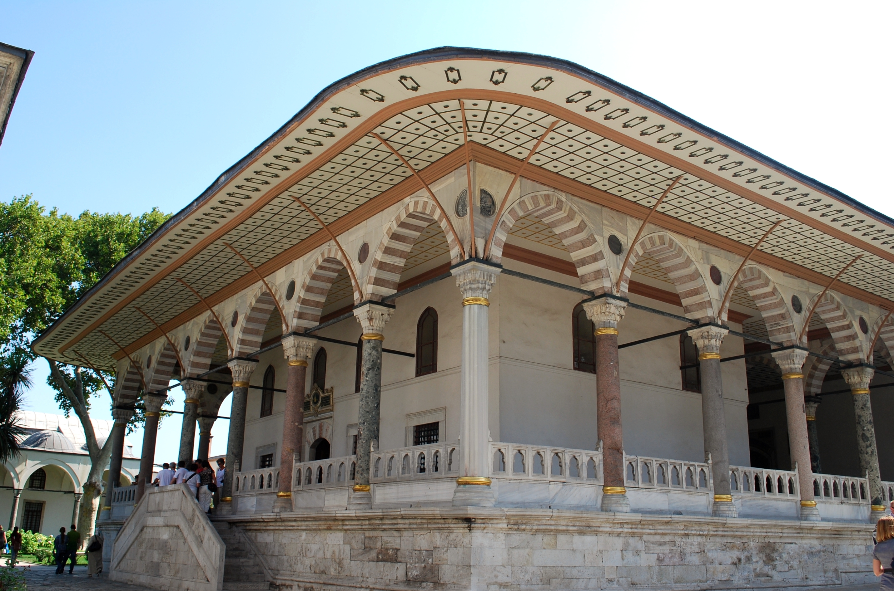 архитектура